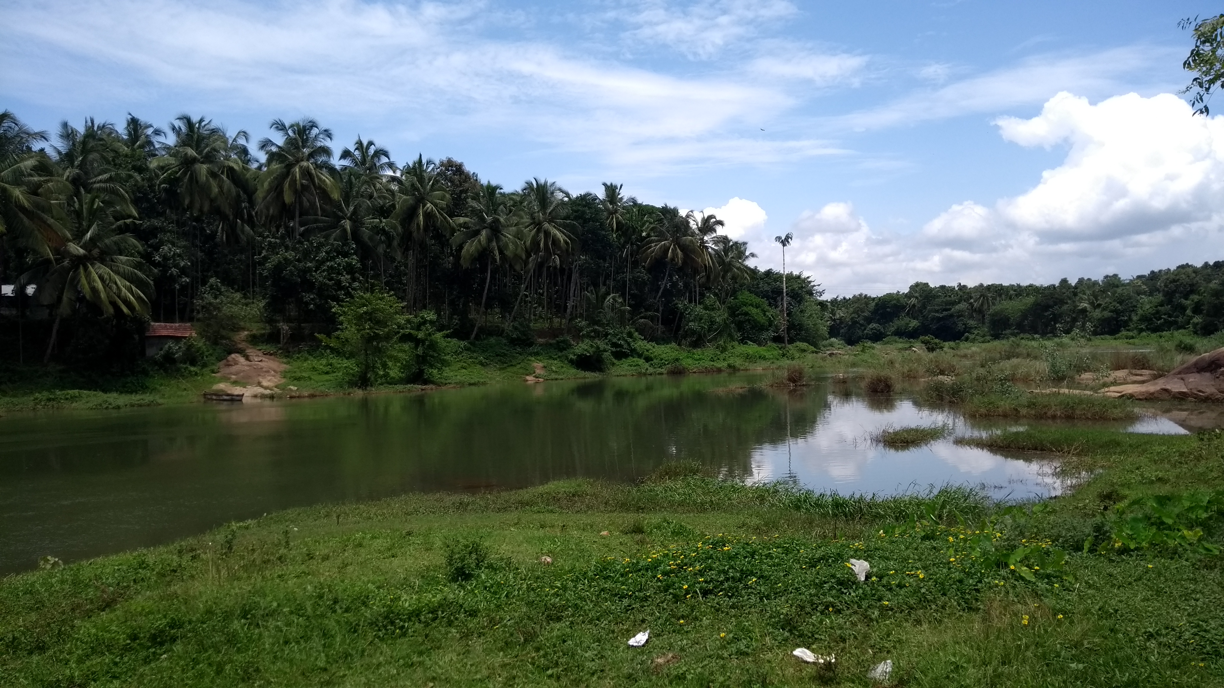 river from karalmanna, Kerala India